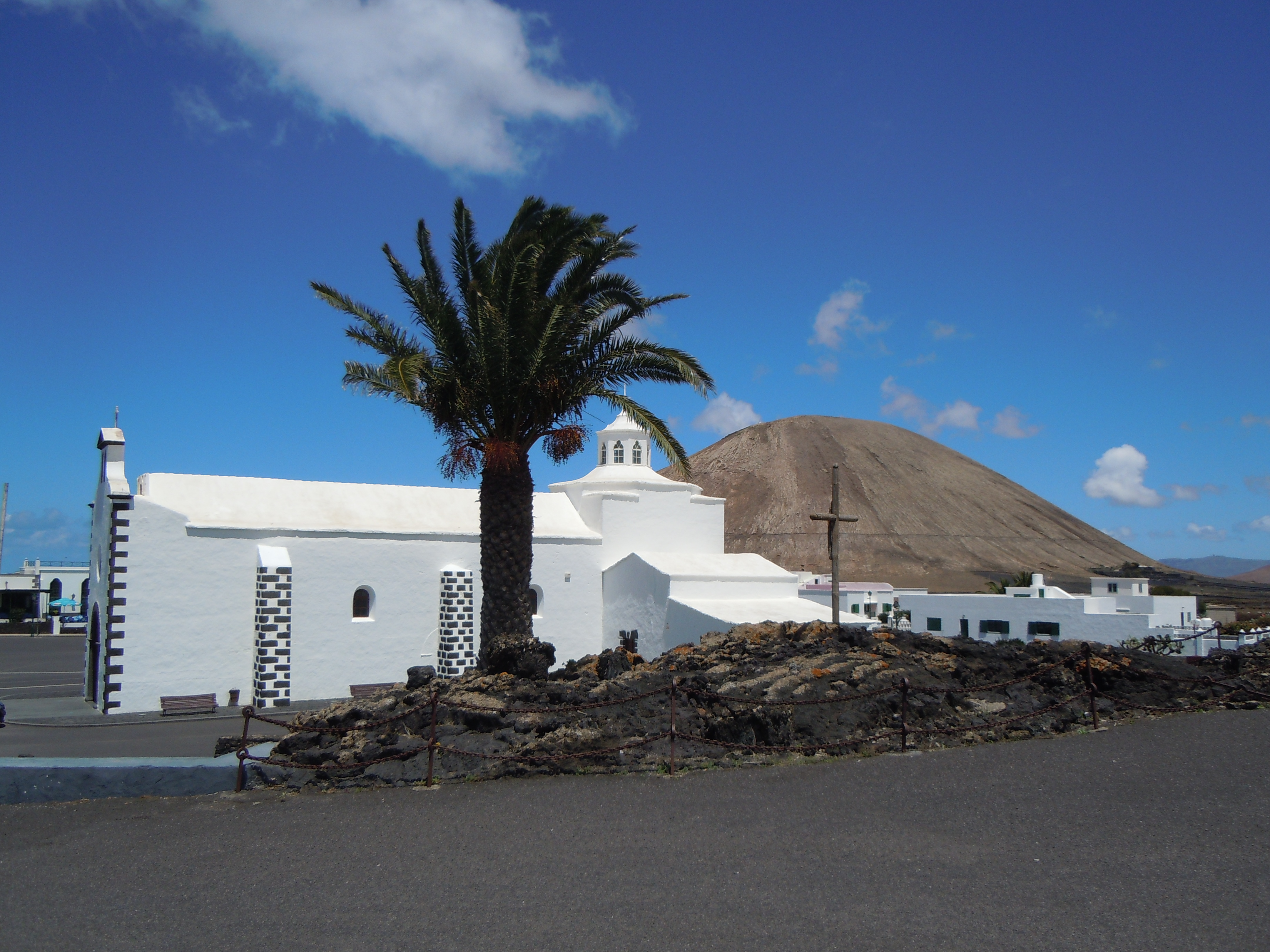 Ermita de los Dolores devant la Montana Tinache, Mancha Blanca, Tinajo, Lanzarote